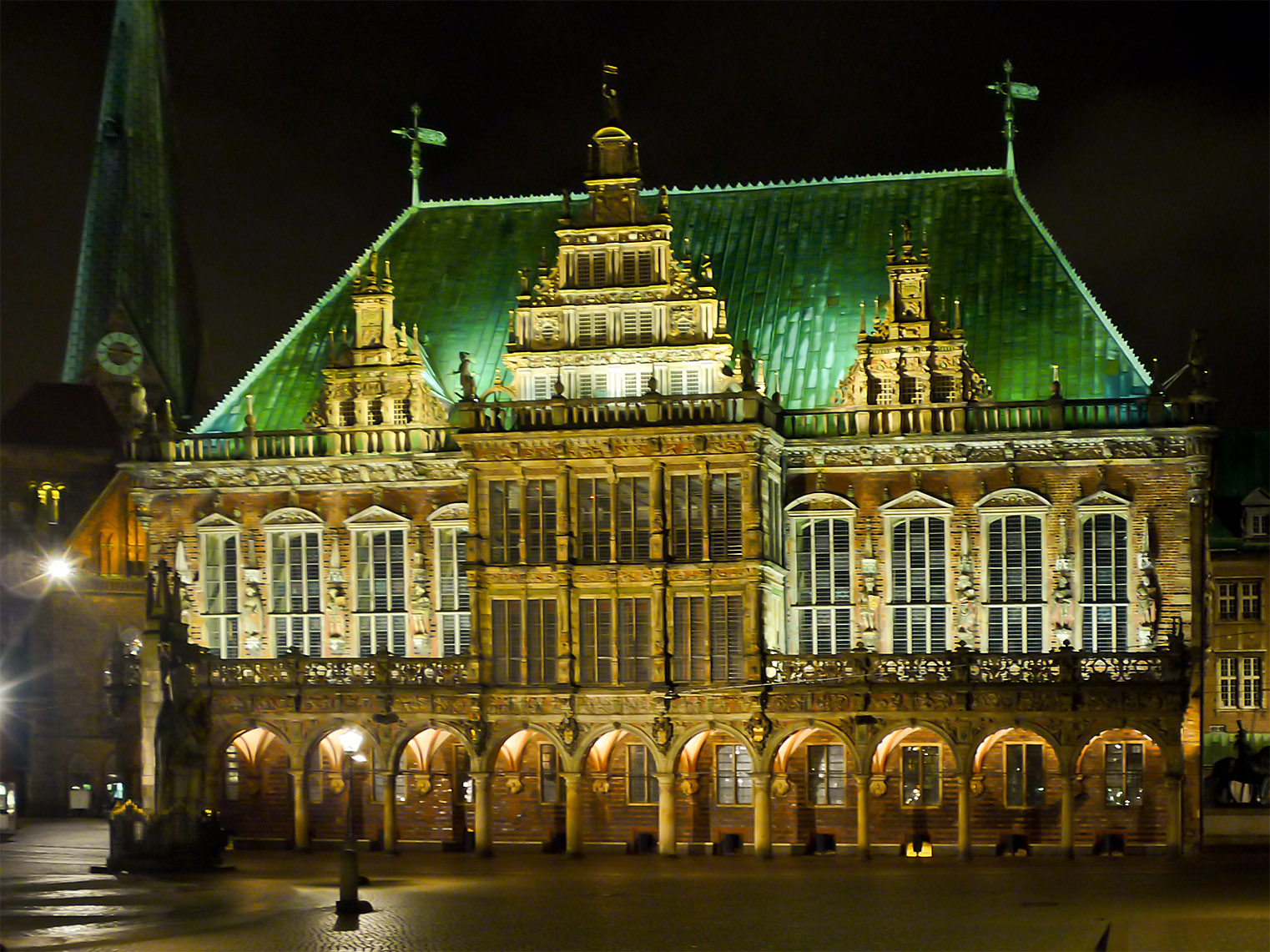 Bremer Rathaus - Im Hintergrund der Kirchturm Unser Lieben Frauen - Altstadt,Am Markt 21Das abgebildete Objekt ist ein geschütztes Kulturdenkmal in der Freien Hansestadt Bremen, mit der Nr. 0066,T001 beim Landesamt für Denkmalpflege registriert.